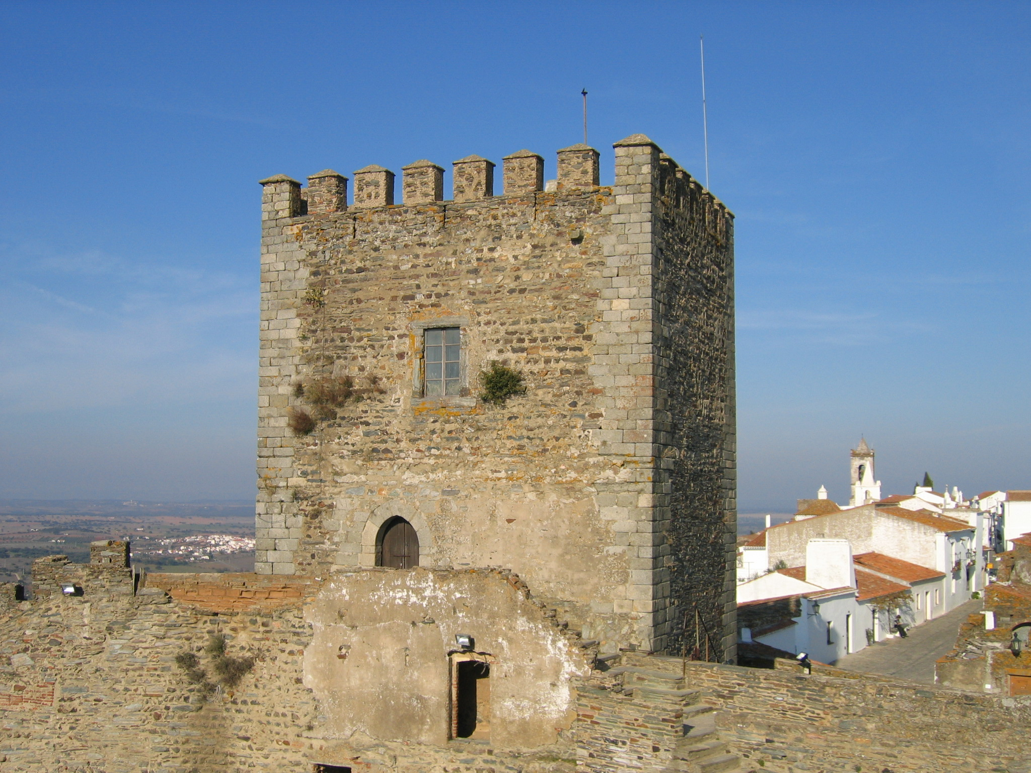 Monsaraz